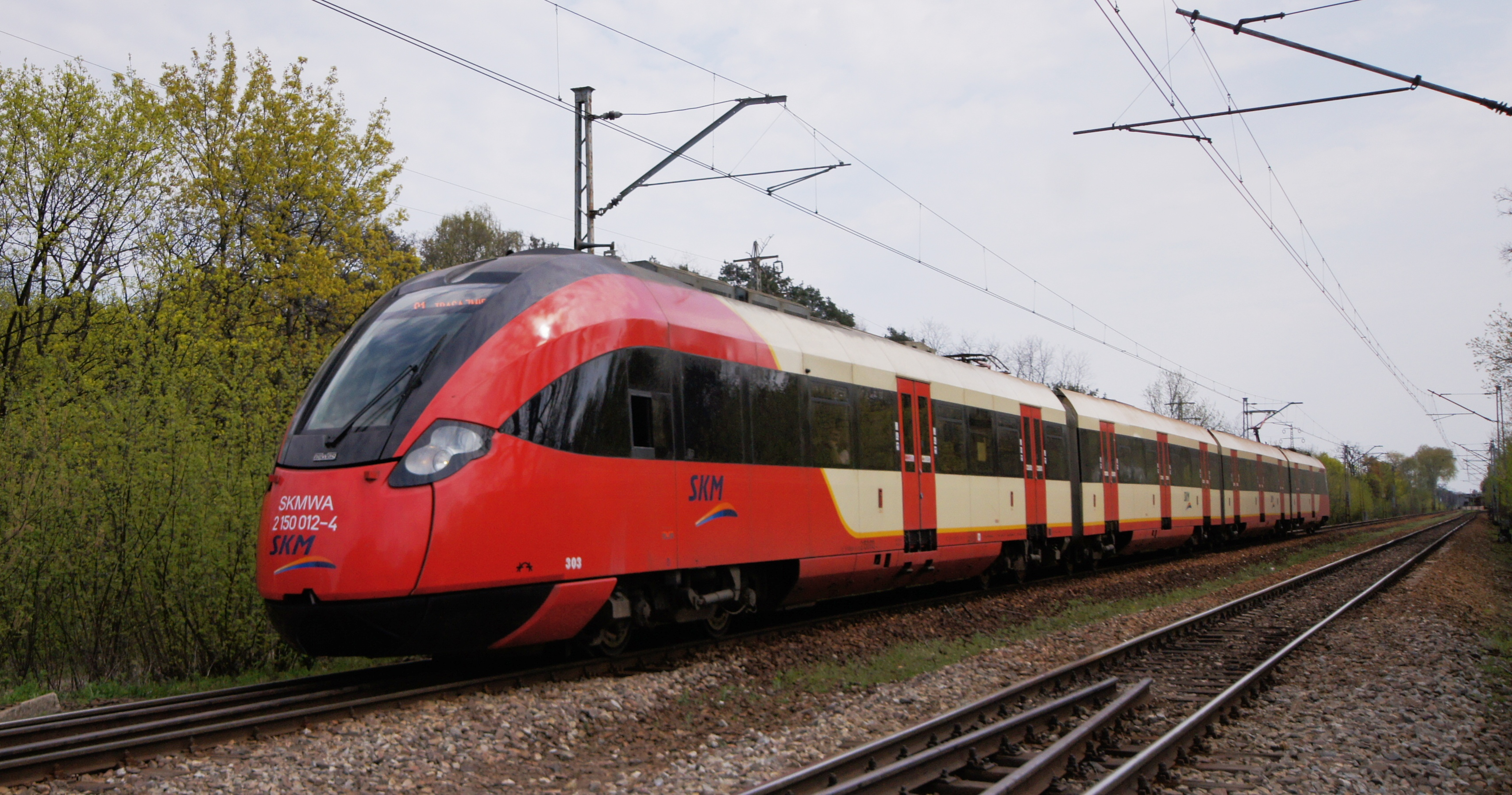 Pociąg typu 19WE - SKM Warszawa - Linia S1